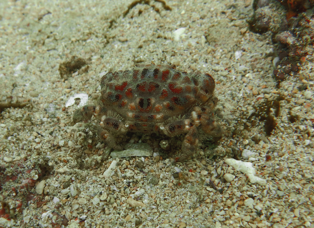 Paractaea rufopunctata forme frontalis à la Réunion.